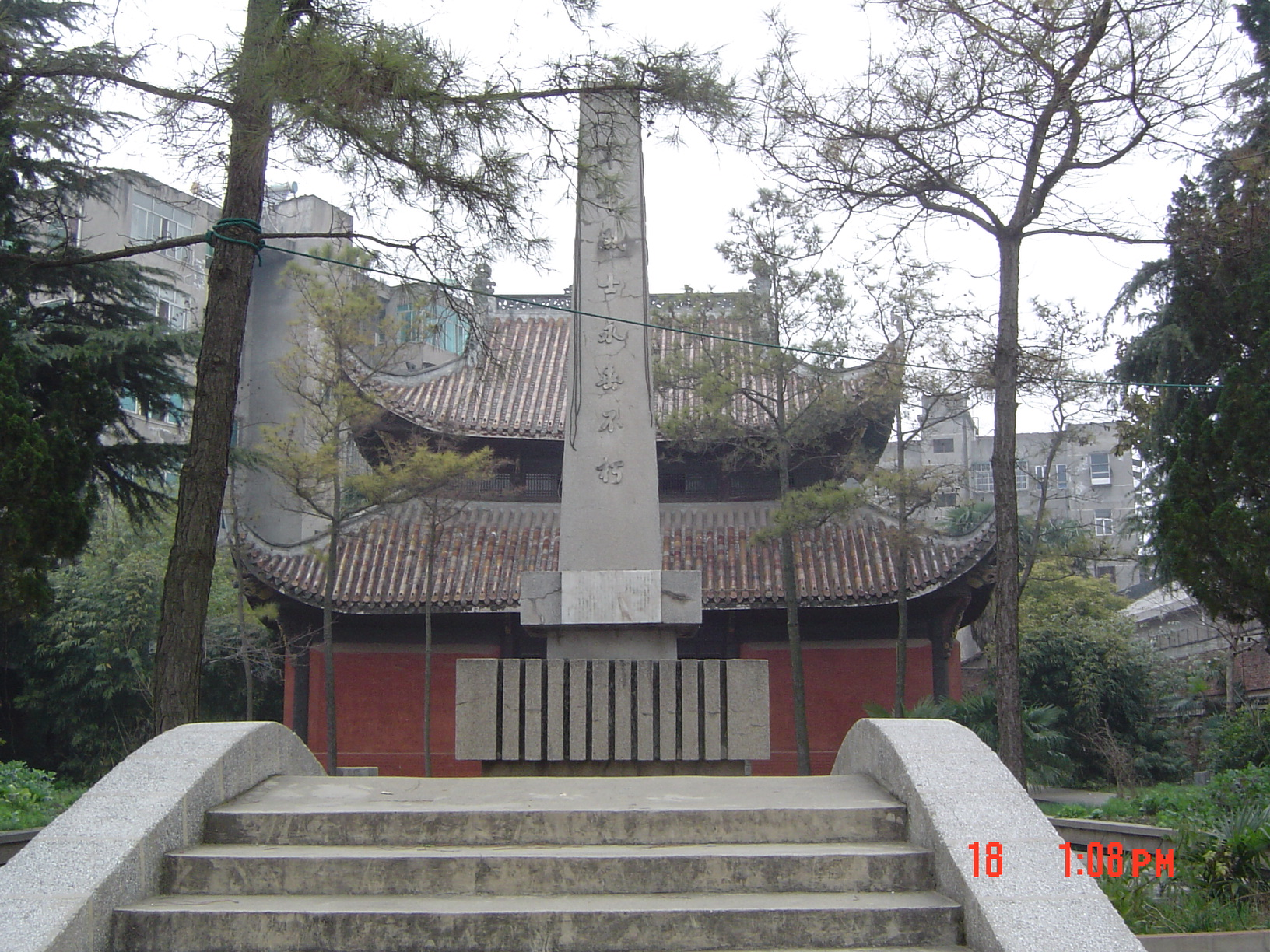 2007 湖北 公安县 南平文庙